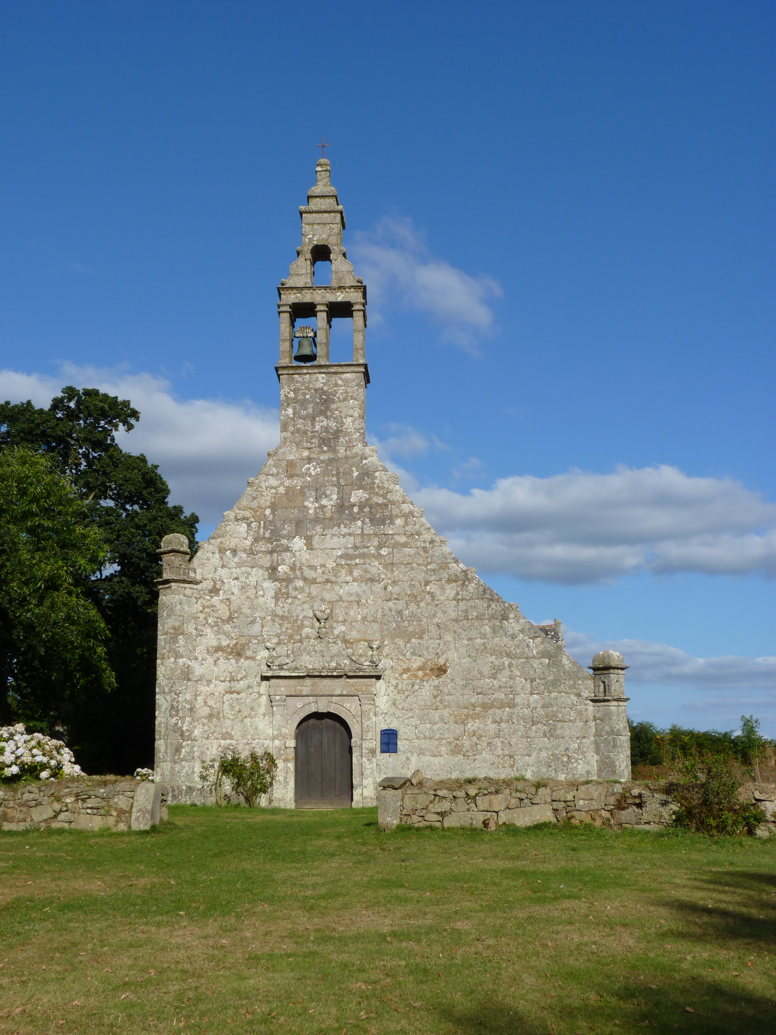 Chapelle du XVIème siècle.